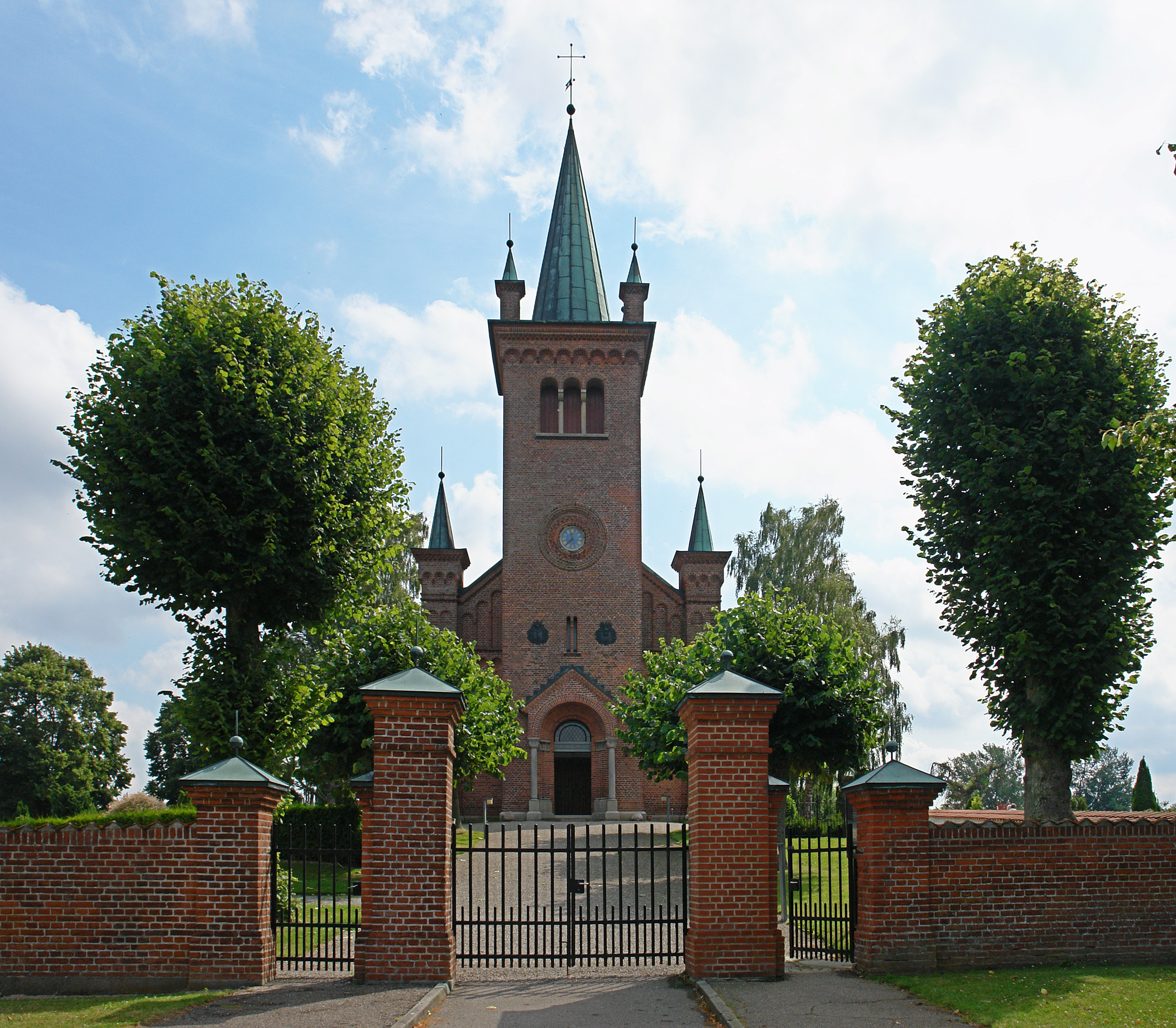 Kirche von Ugerløse, Dänemark (West-Seeland). Romanische Backsteinbau von 1876.